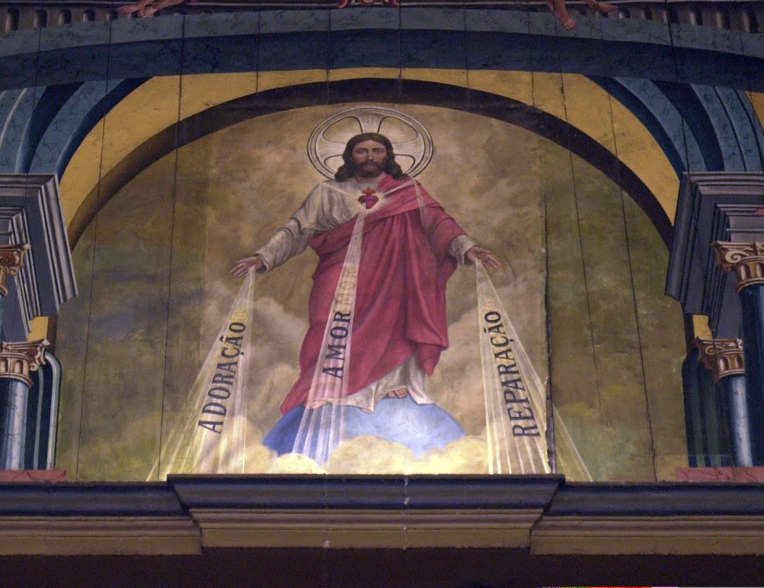 Baseado numa visão da Madre Virgínia Brites da paixão